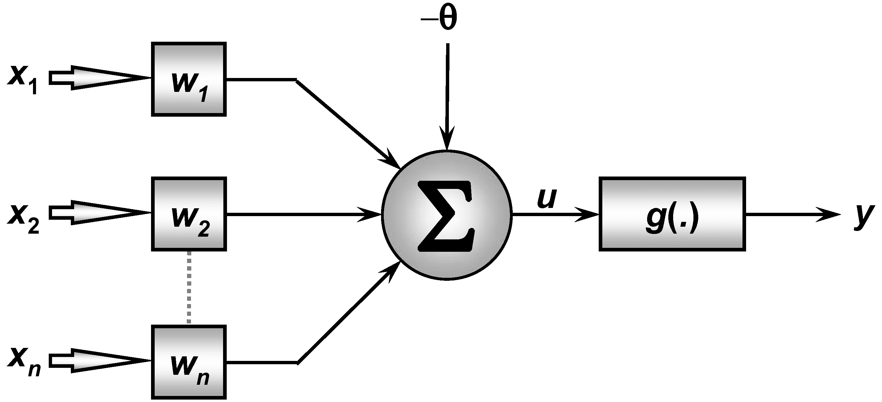 xas